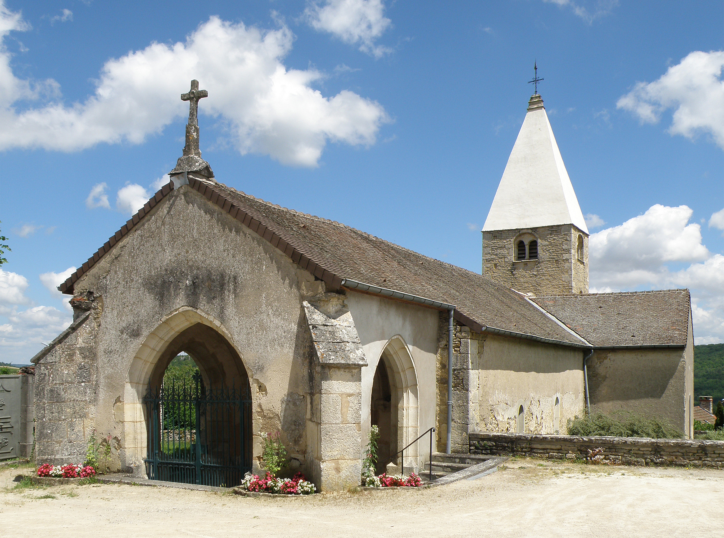 Baubigny (Côte-d'Or, Bourgogne, France). Église Saint-Léger.